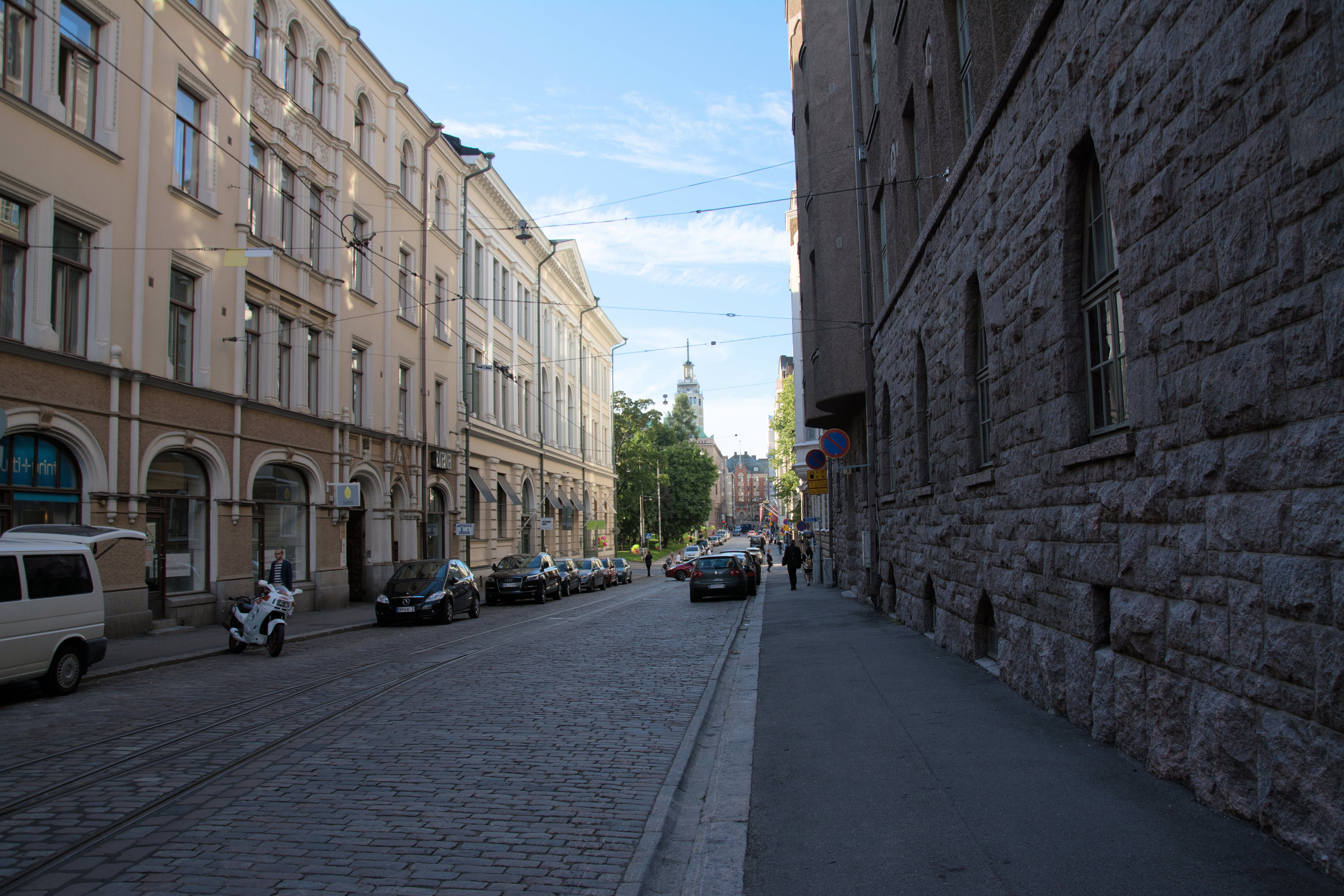 Yrjönkatu Helsingissä